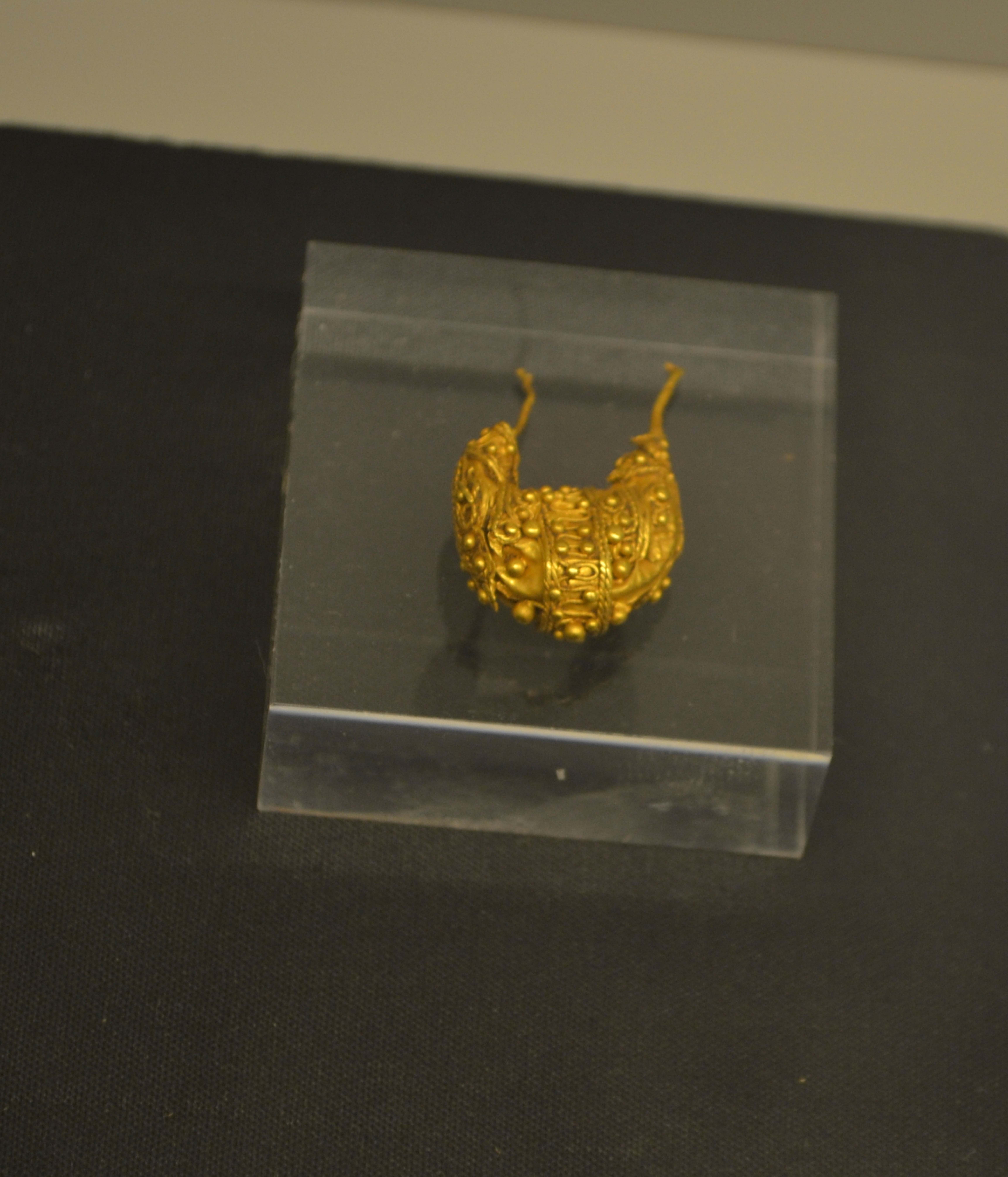 Arracade iber dór. Covalta (Albaida). Segles V-III aC. Museu de Prehistòria de València.